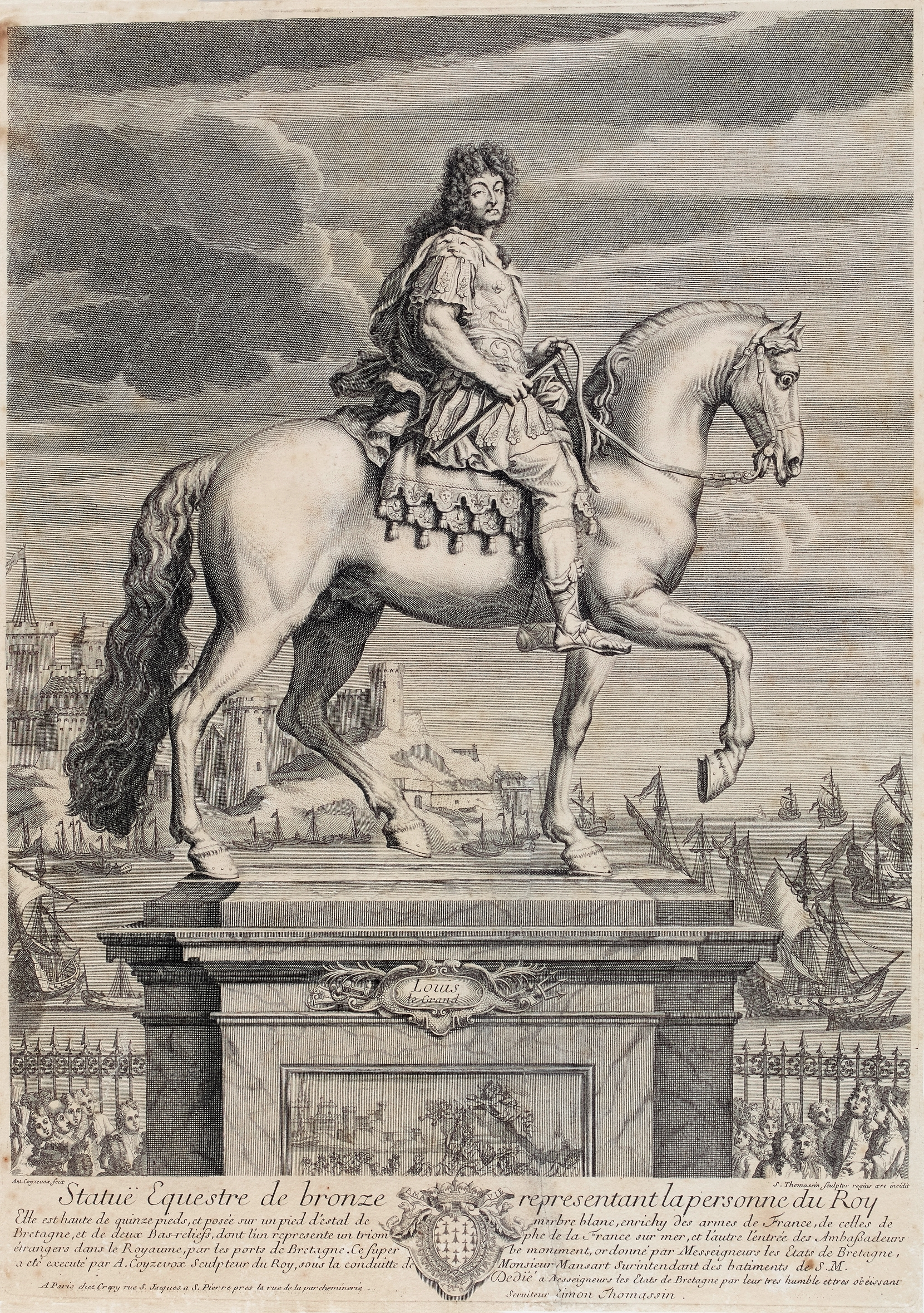 Estampe à l'eau-forte représentant la statue équestre en bronze de Louis XIV par Antoine Coysevox, commandée en 1686 et érigée à Rennes en 1726, détruite en 1793. Hauteur 48,1 cm, largeur 34,2 cm. Document du musée de Bretagne (Rennes), numéro d'inventaire : 2016.0000.2811